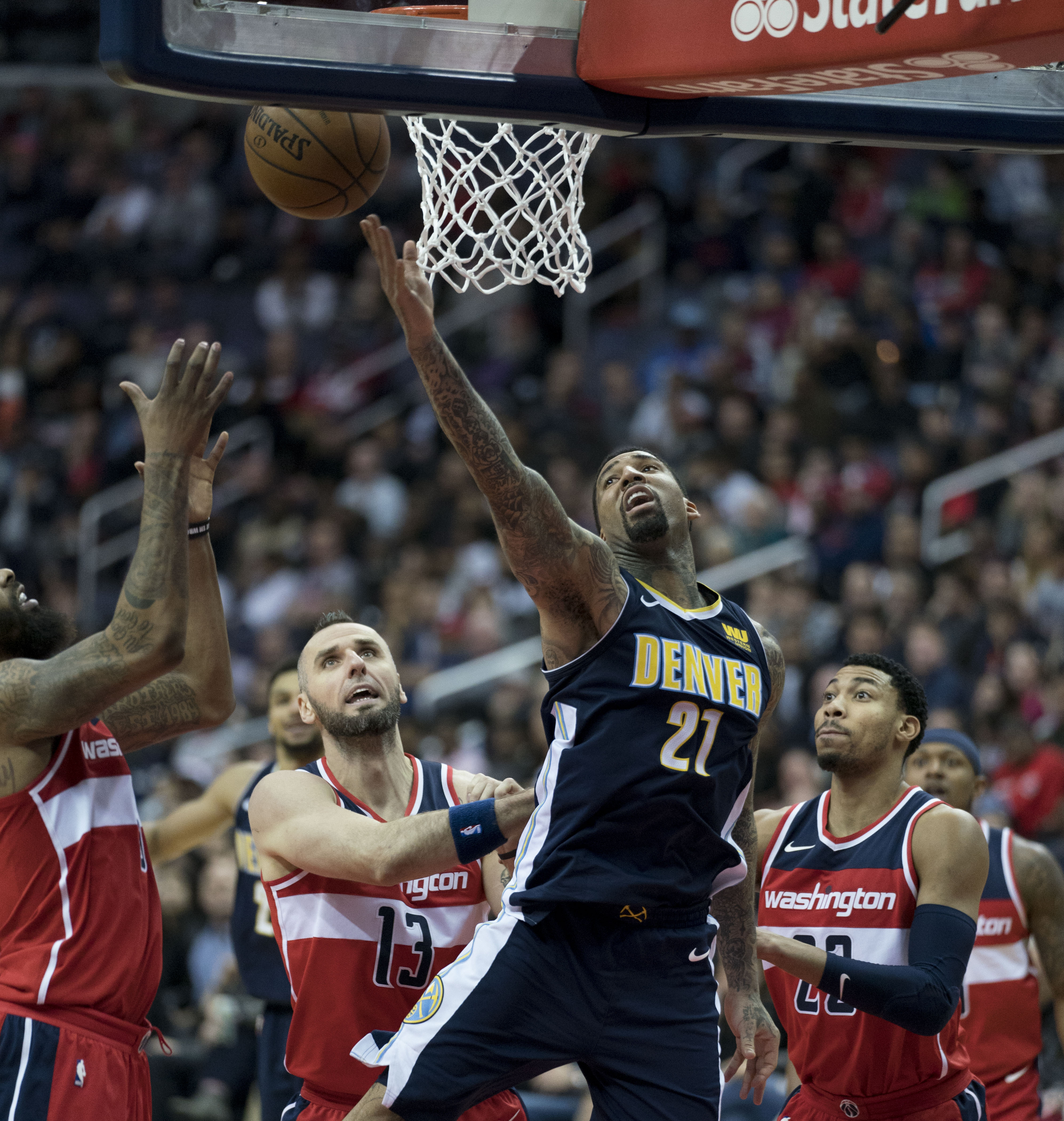 Nuggets at Wizards 3/23/18